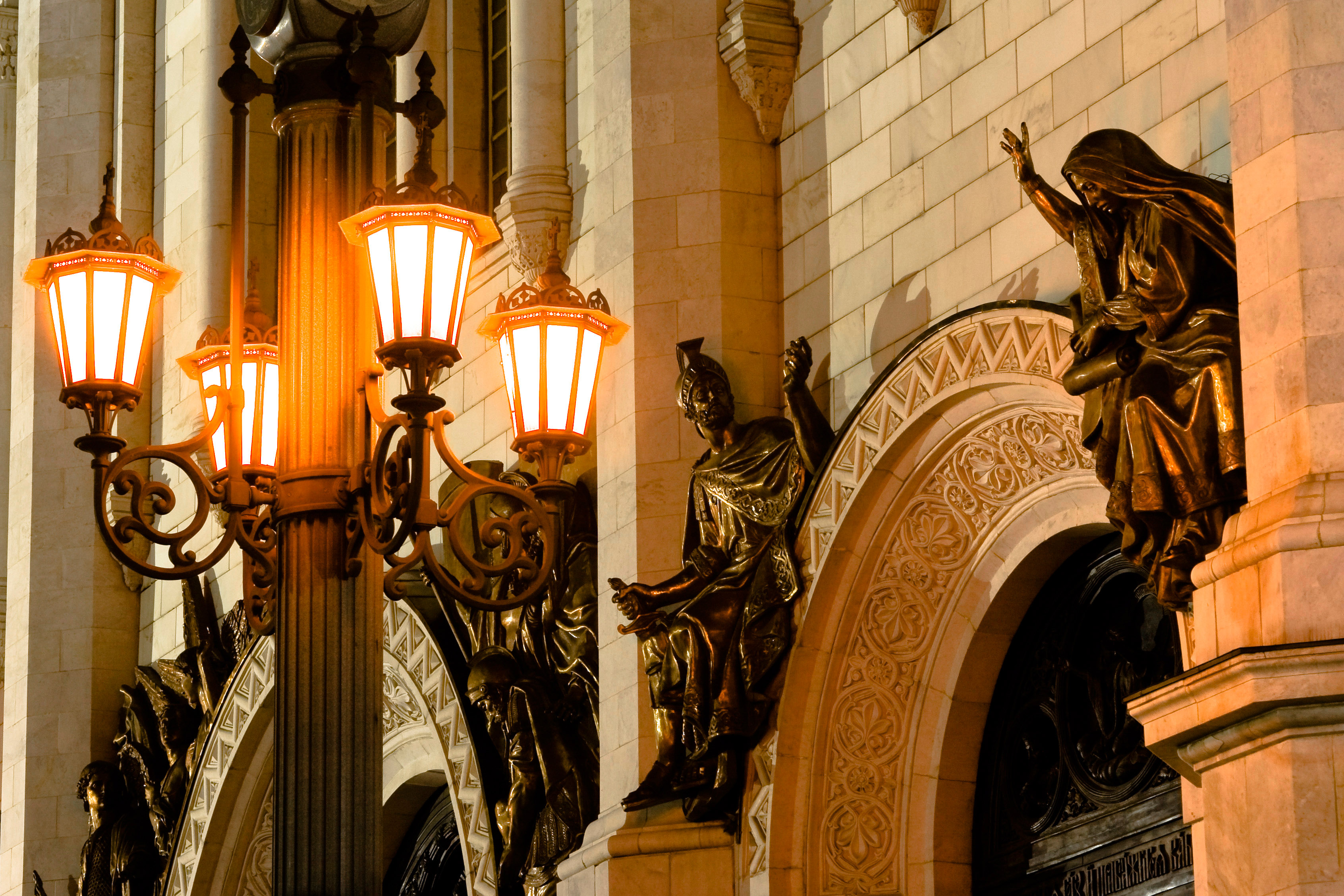 Скульптуры восстановленного храма Христа Спасителя. Автор З. Церетели.